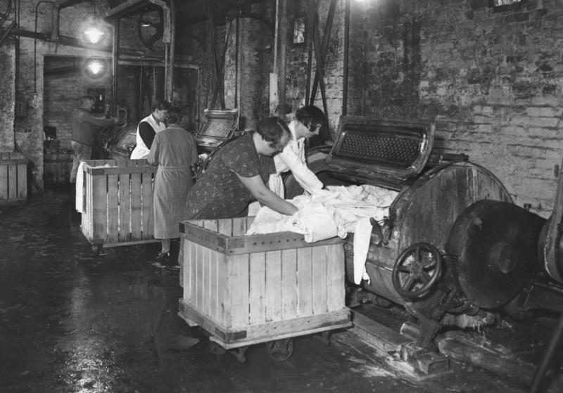 Großwäscherei Bildbericht aus einer Groß-Wäscherei Die sortierte Wäsche wird in die kupferne Wäschetrommel gestopft; so dann wird diese geschlossen und Wasser zum Einweichen der Wäsche zugelassen. Fot. Wagner